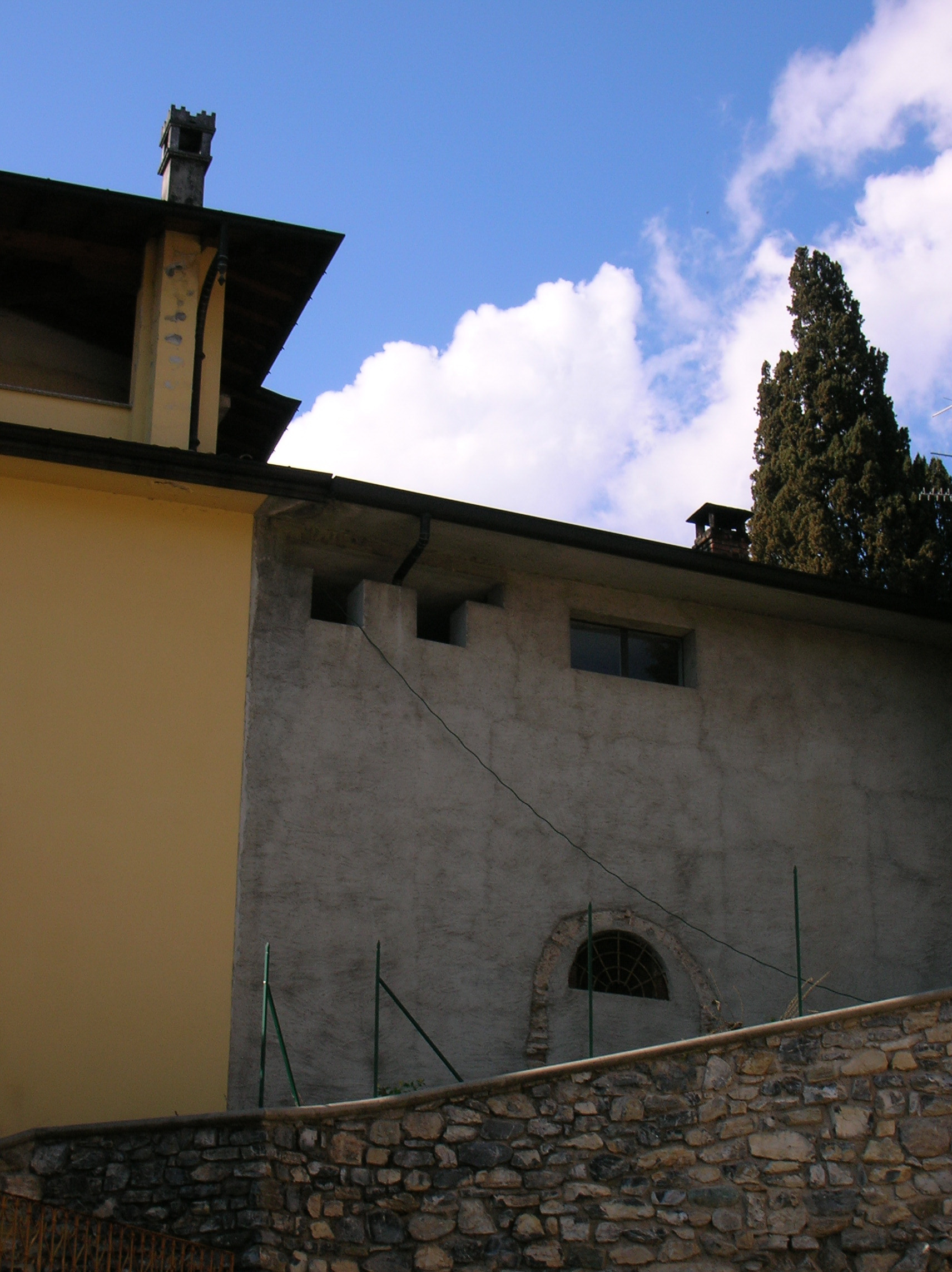 mura merlate del castello di Asso inglobate in un'abitazione